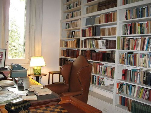 Escritoria de Victoria Ocampo en Villa Ocampo